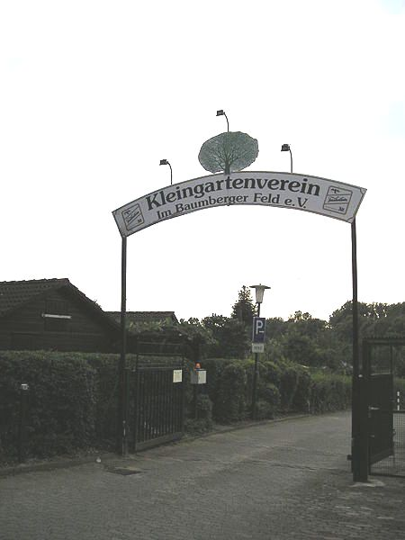 Kleingartenverein im Baumberg Feld e.V.